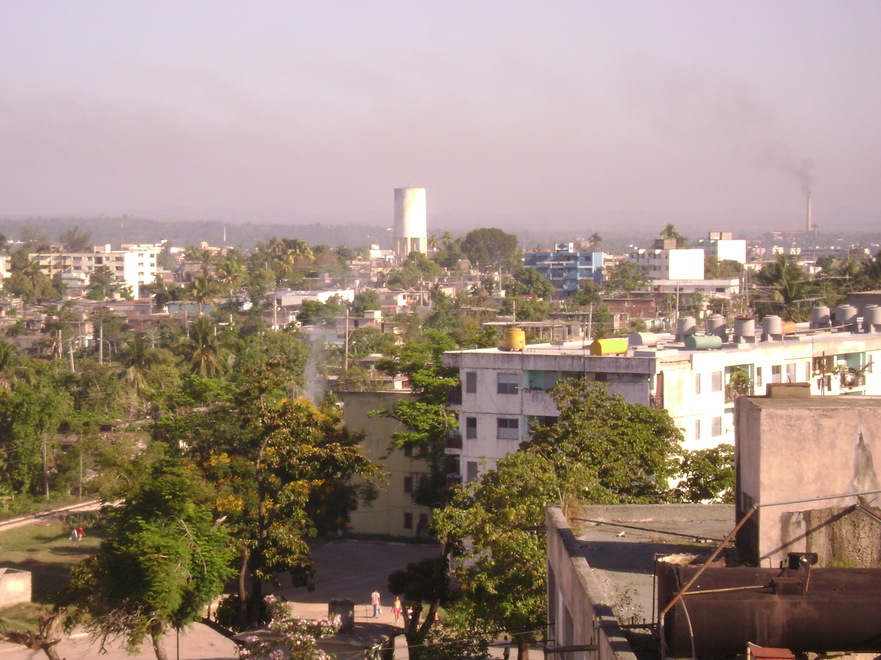 Palma Soriano visto desde el Reparto Nito Ortega